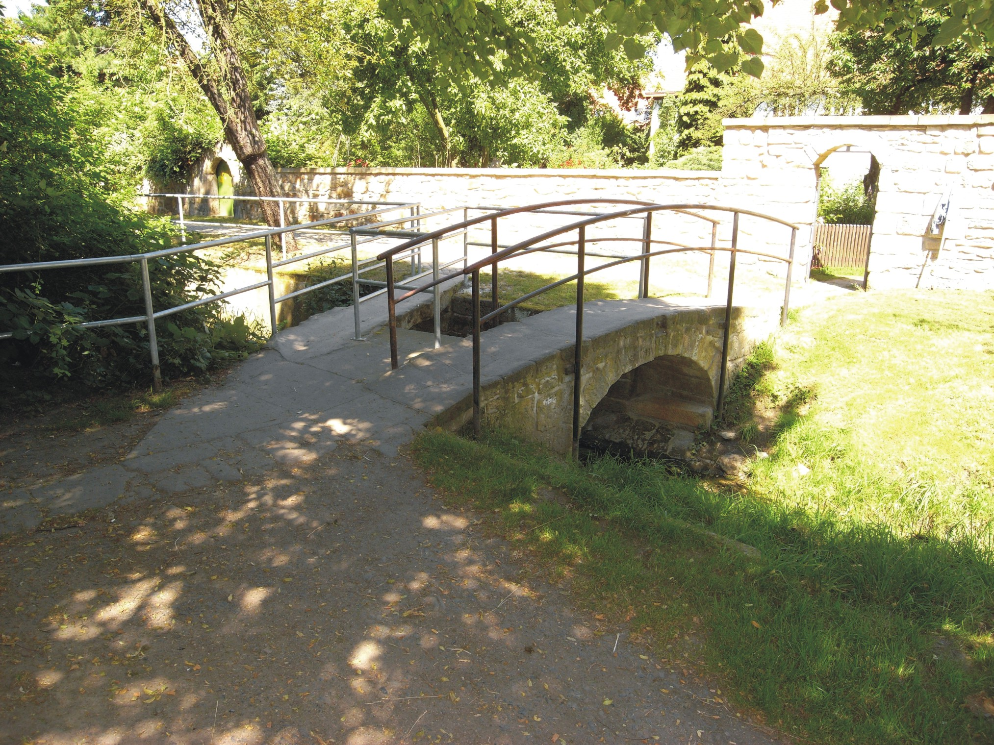 Alte Brücken am Leubnitzbach unweit des Pfarramtes Leubnitz-Neuostra (Dresden / Leubnitz-Neuostra, Sachsen, Deutschland) Engels- und Teufelsbrücke, ursprünglich Pastoren- und Plattenbrücke genannt, Teufelsbrücke aus einem einzigen Sandsteinblock als „kürzeste Brücke Dresdens“ erbaut